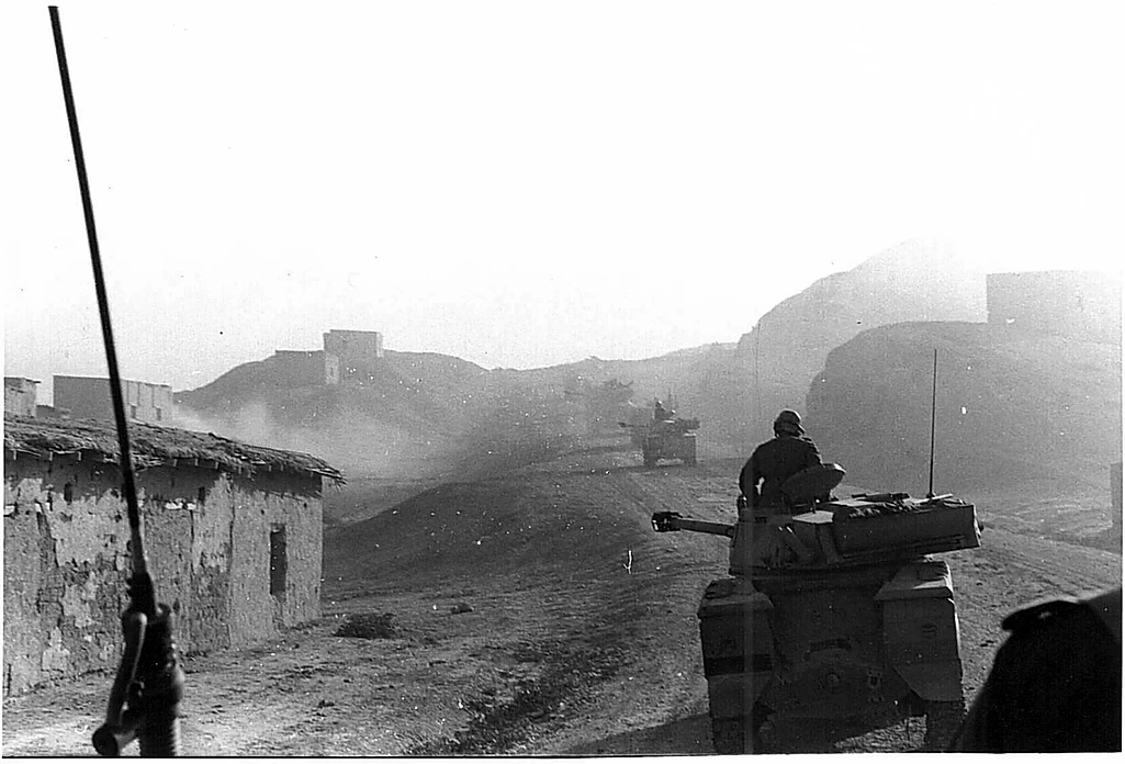 פעולת כראמה. חציית כפר דמיה.